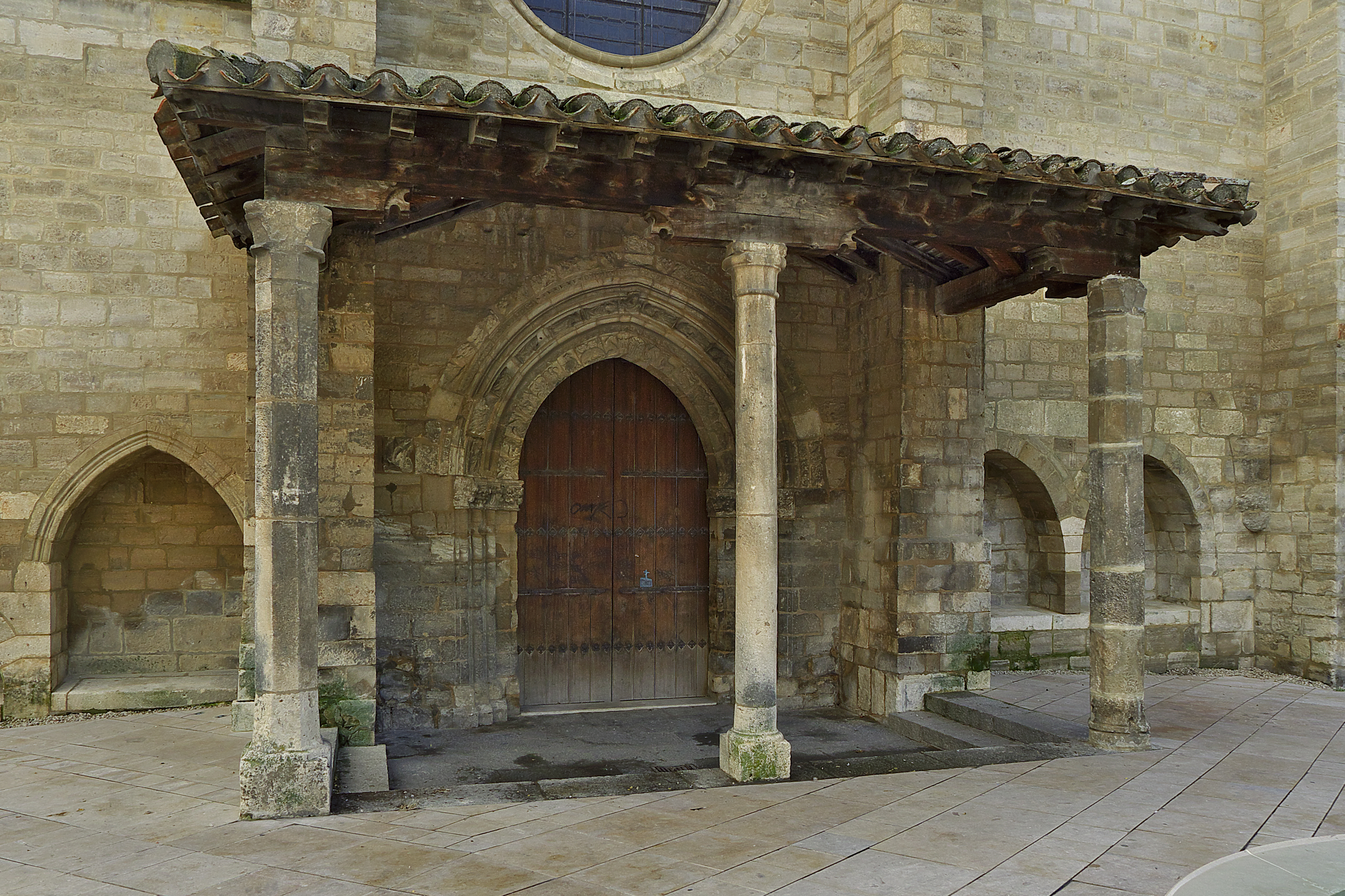 Portada en la nave del Evangelio